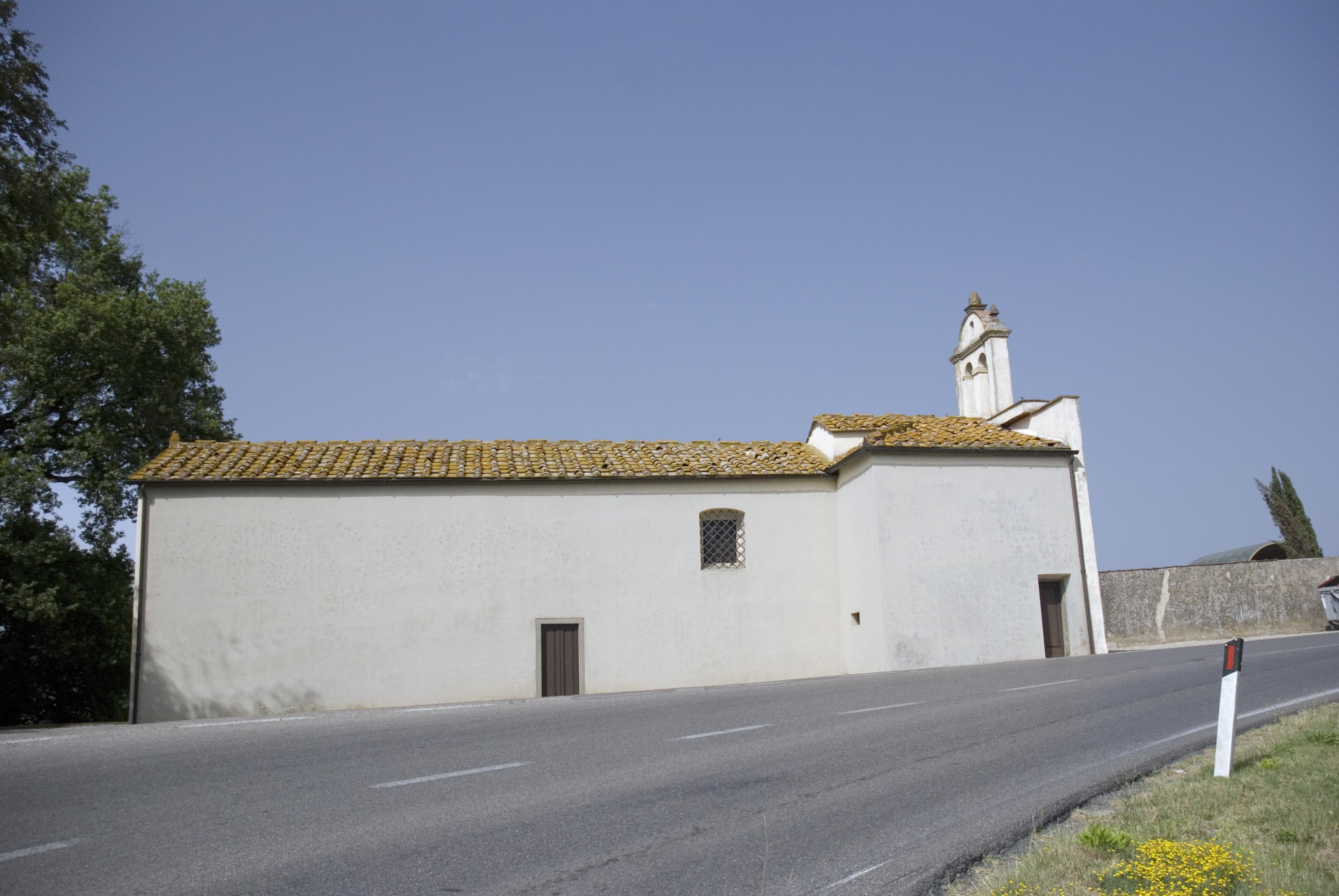 Chiesa situata presso il cimitero di Cerbaia